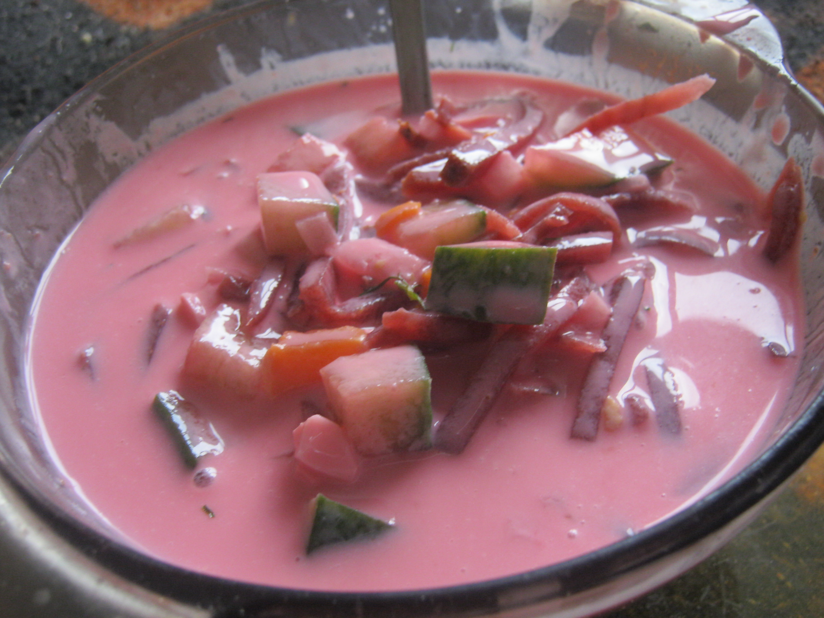 Šaltibarščiai